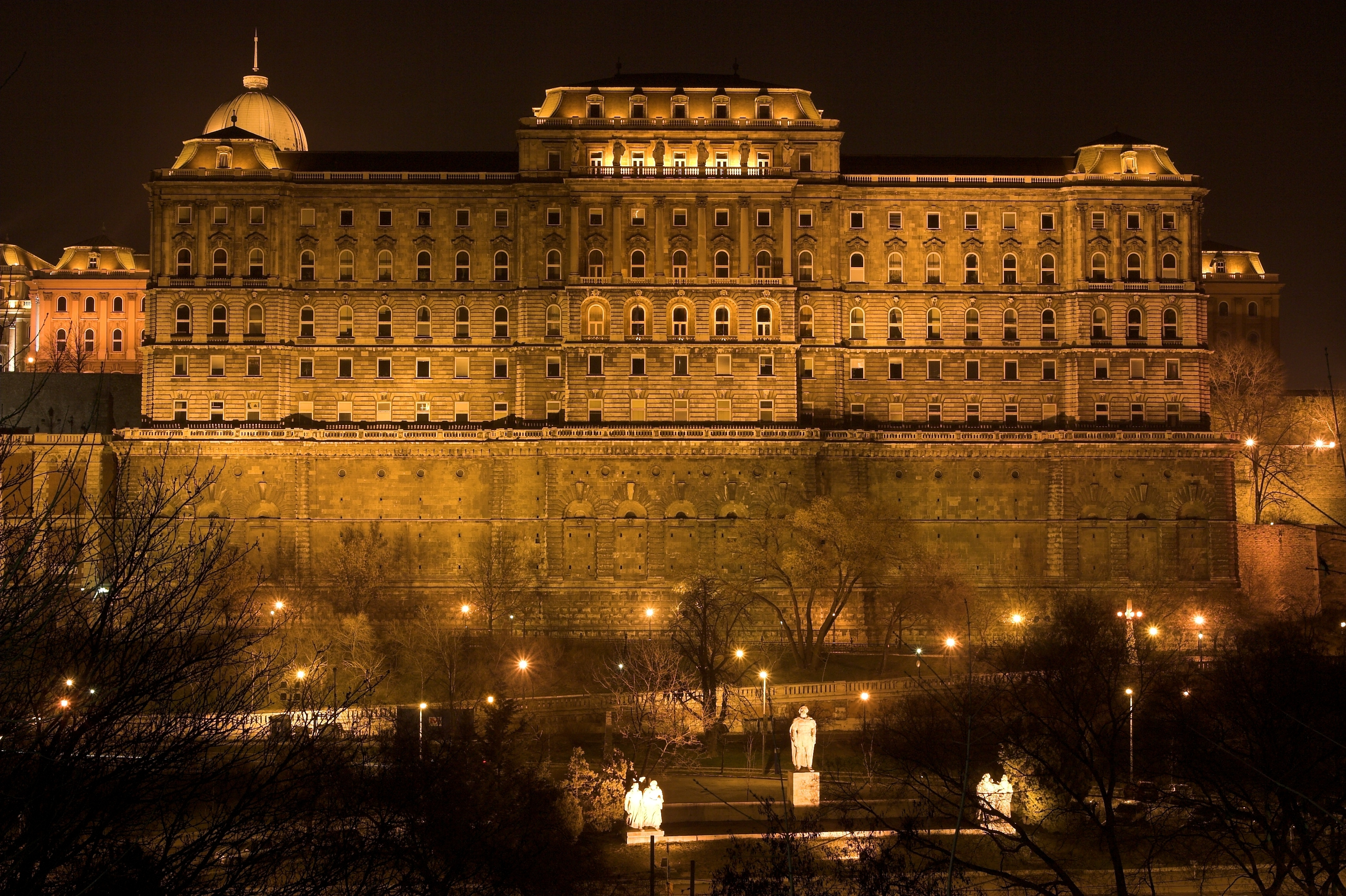 Az Országos Széchényi Könyvtár Budapesten.